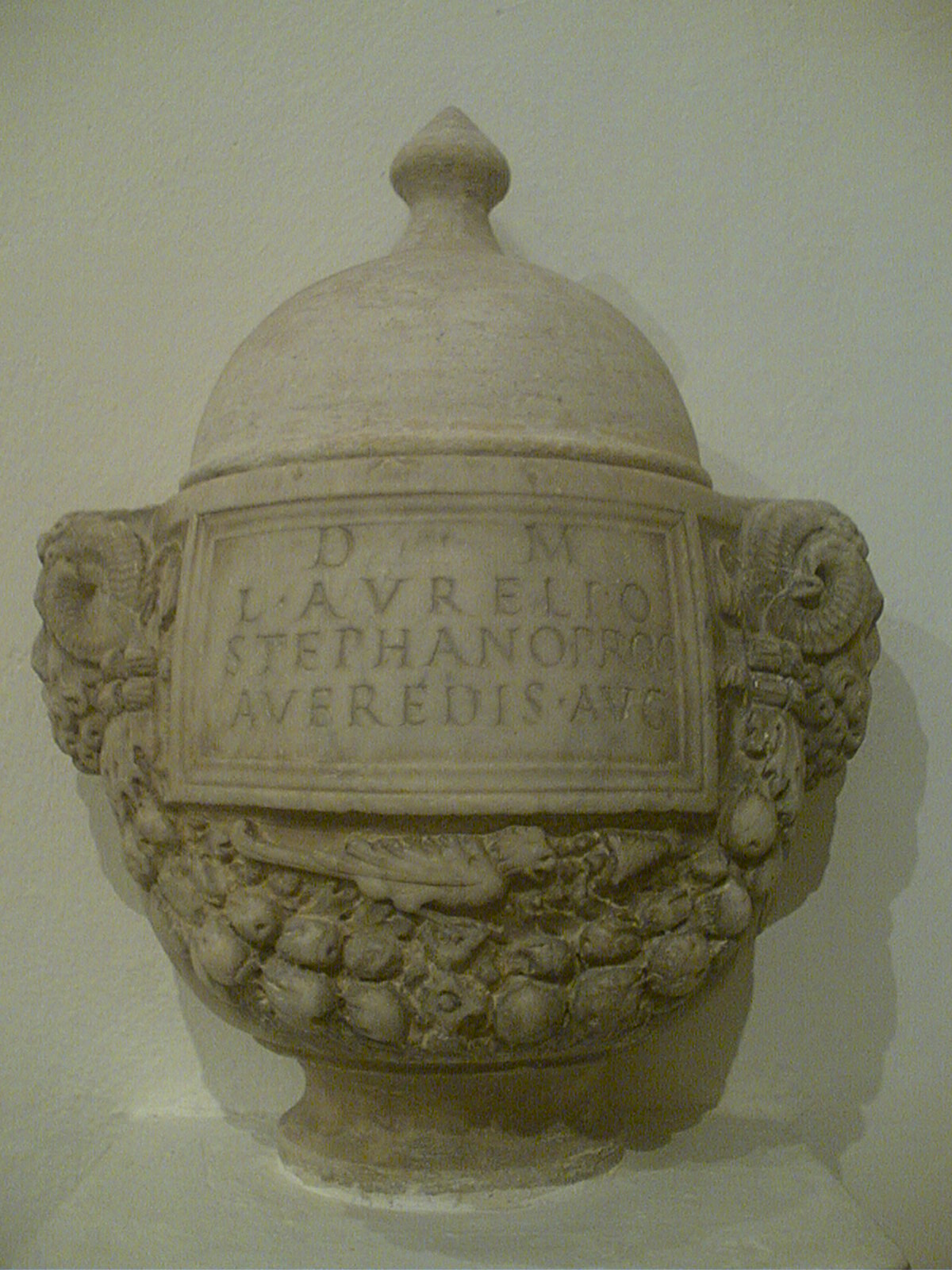 Urna cineraria di epoca romana all'interno della Chiesa Madre - San Benedetto Ullano (CS)